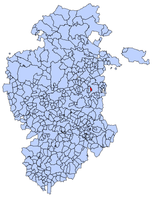 Tosantos en Burgos